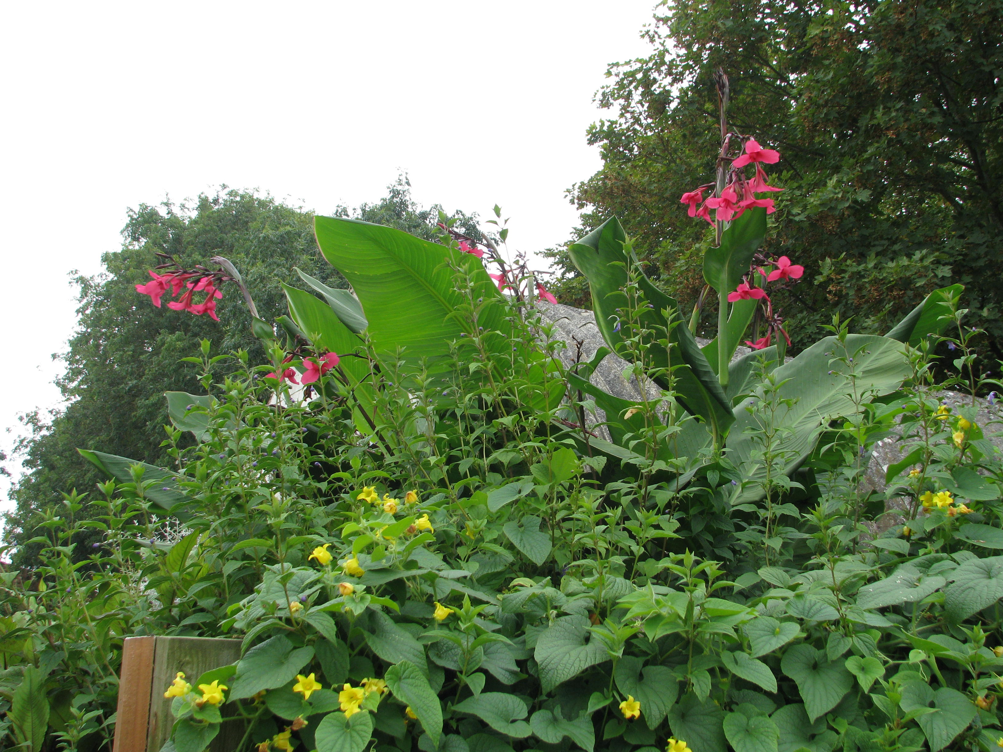 Canna x ehemannii, Caryopteris divaricata & Thladiantha dubia